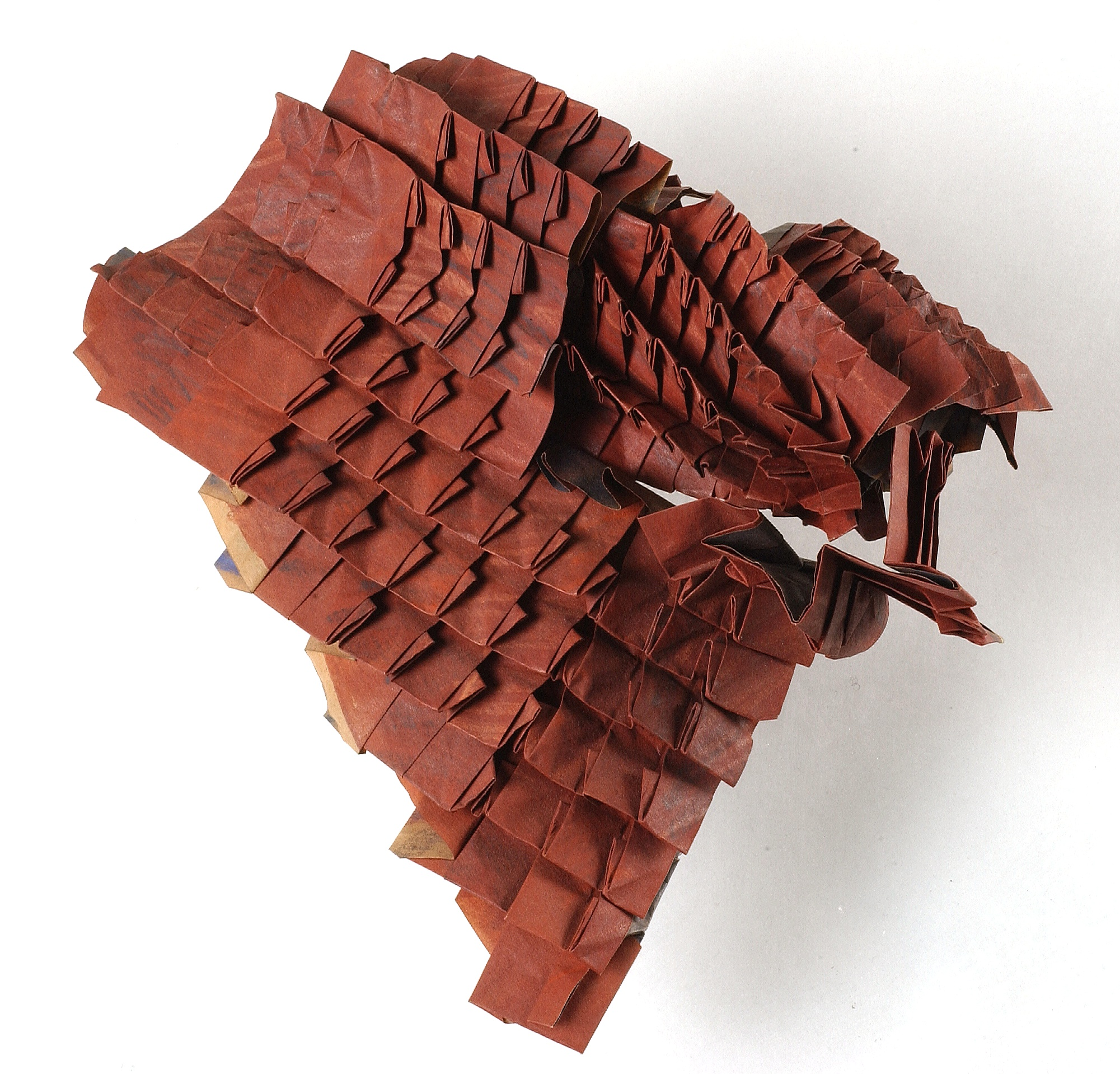 "Trou 1", Oeuvre en papier plié de l'artiste Jean-Claude Correia né en 1945 à Casablanca et décédé en 2016 à Paris.